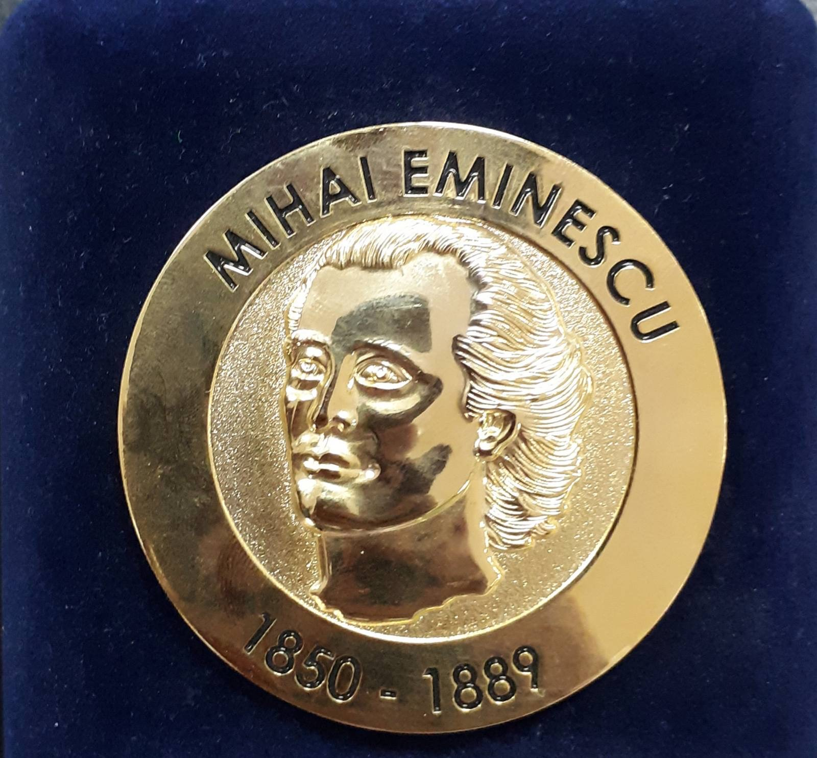 çmimi nderkombetar Mihai Eminescu